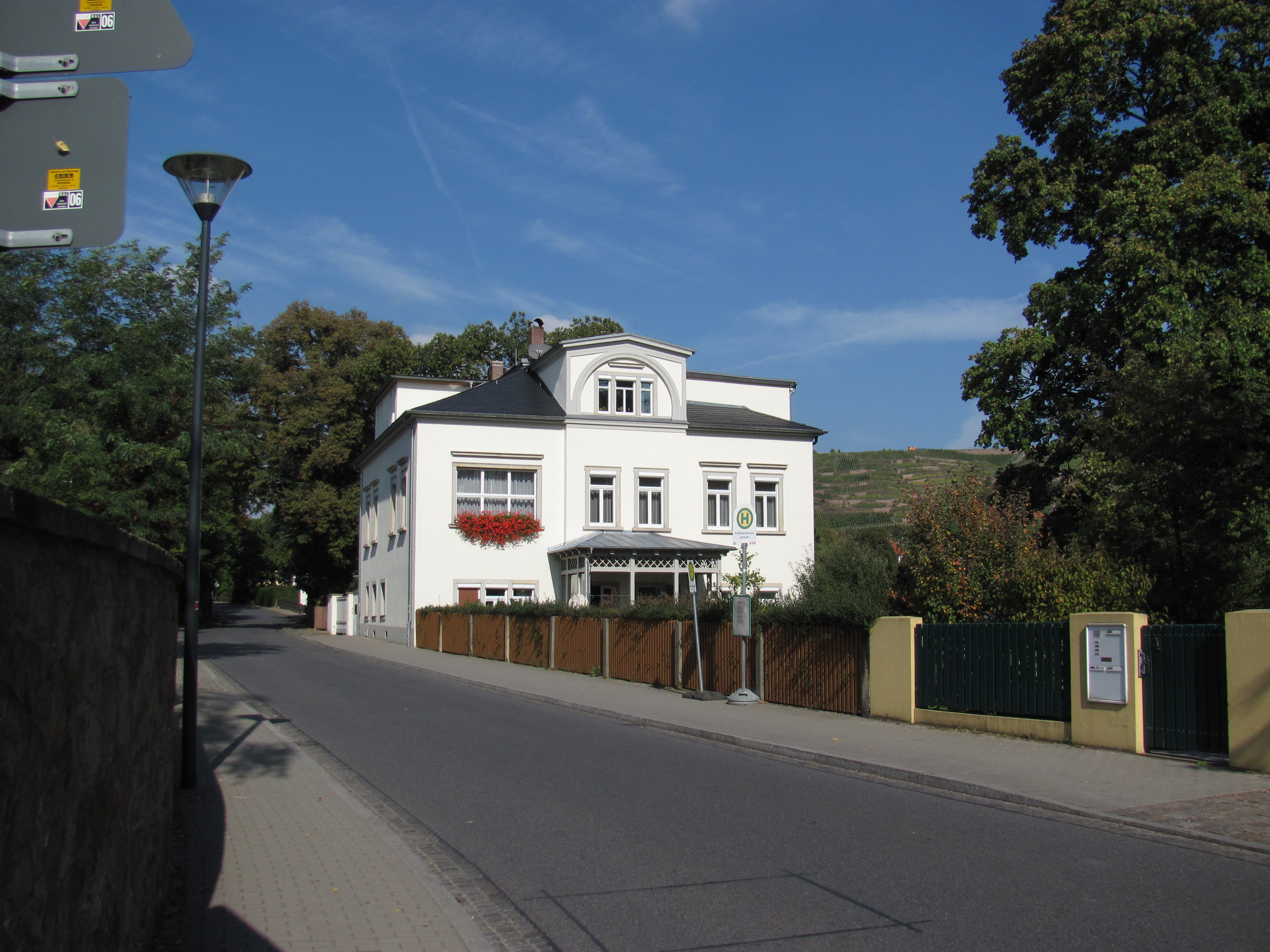 Radebeul Haus Paradiesstraße 8